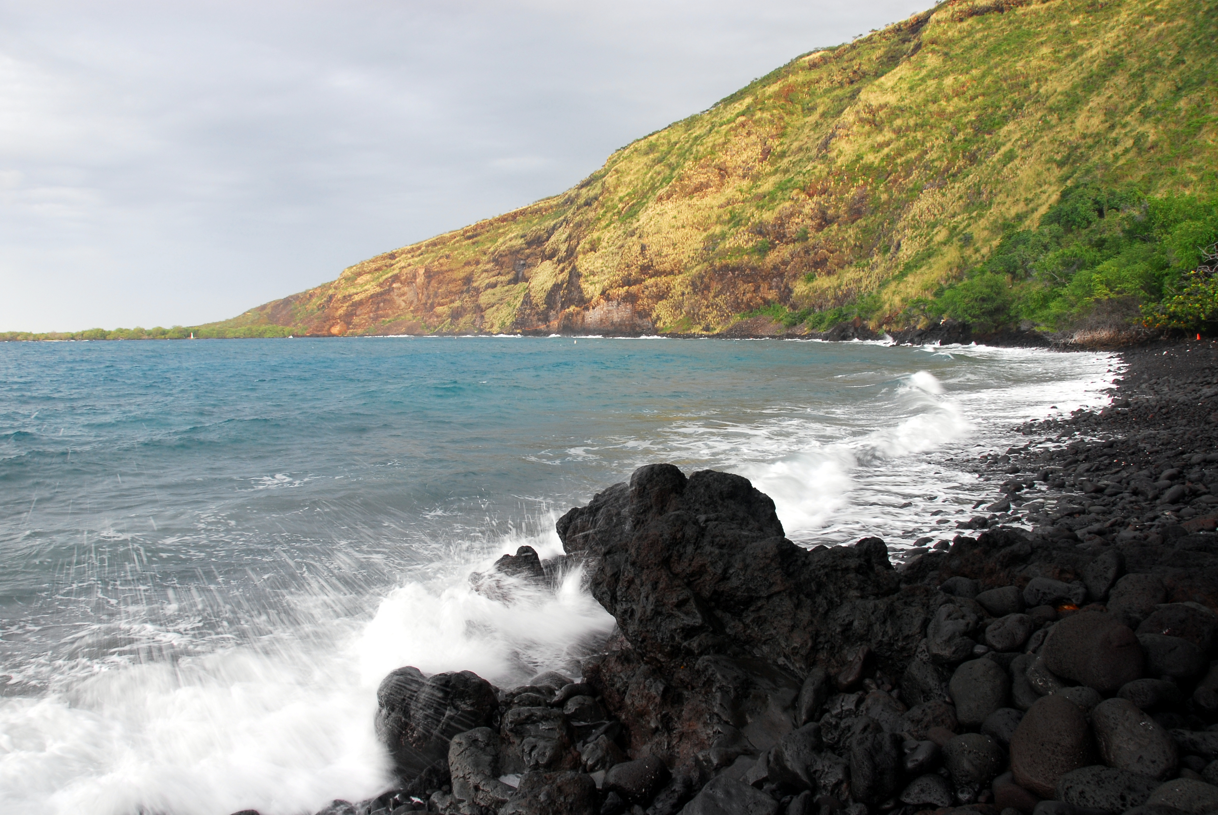 Kealakekua Bay on Hawaii.